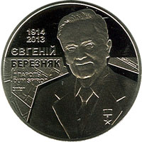 реверс пам'ятної монети до 100-річчя Євгенія Березняка